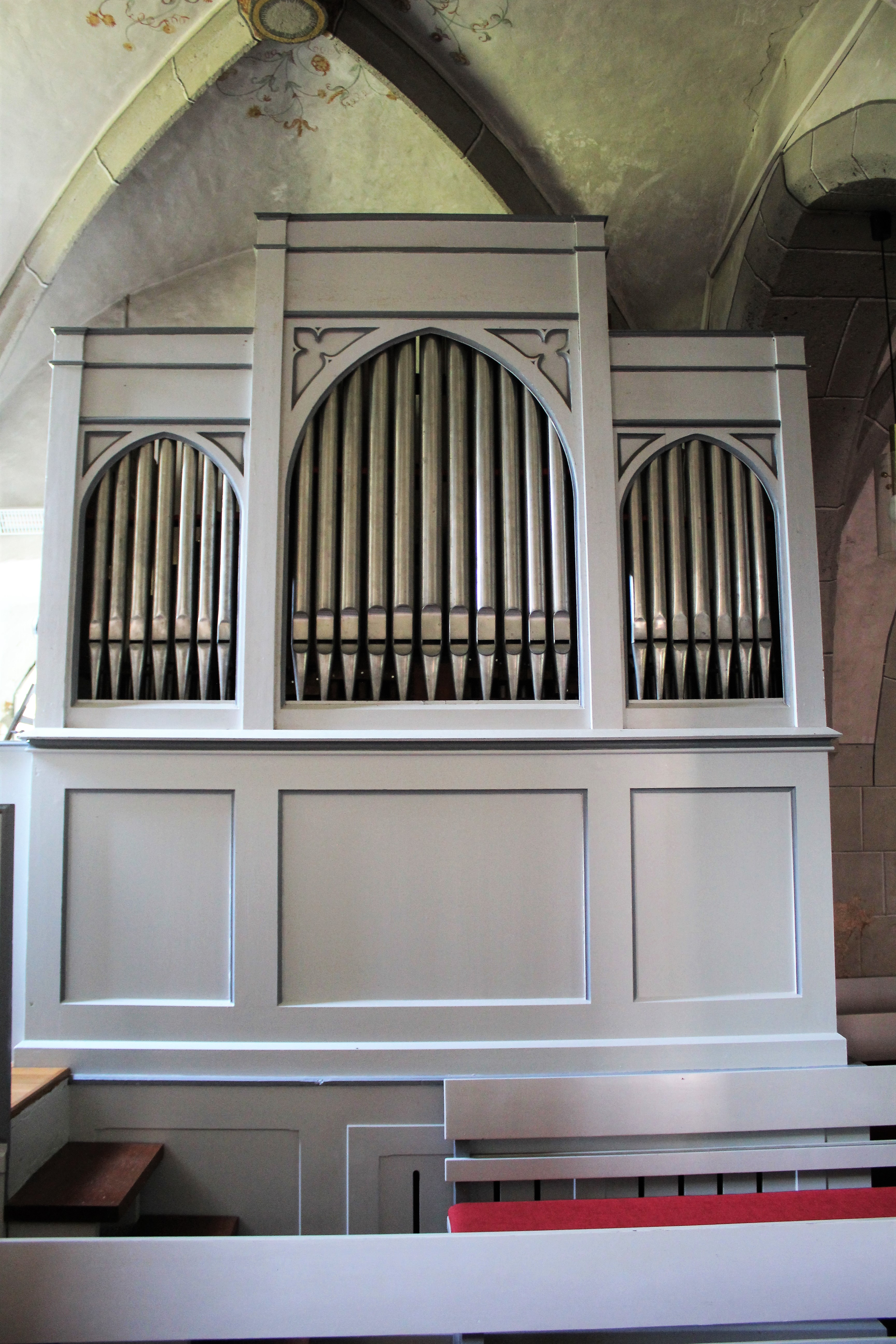 Evangelische Kirche Münster, Laubach, Landkreis Gießen, Hessen, Deutschland